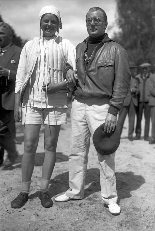 Die große internationalen Motorbootrennen auf dem Templiner-See b/Potsdam, fanden unter Anwesenheit von deutschen, englischen, amerikanischen und französischen Rennbooten statt. Zwei der populärsten Teilnehmer am internationen Mortbootrennen , Miss Hentschel, Amerika (links) und Fritz von Opel.